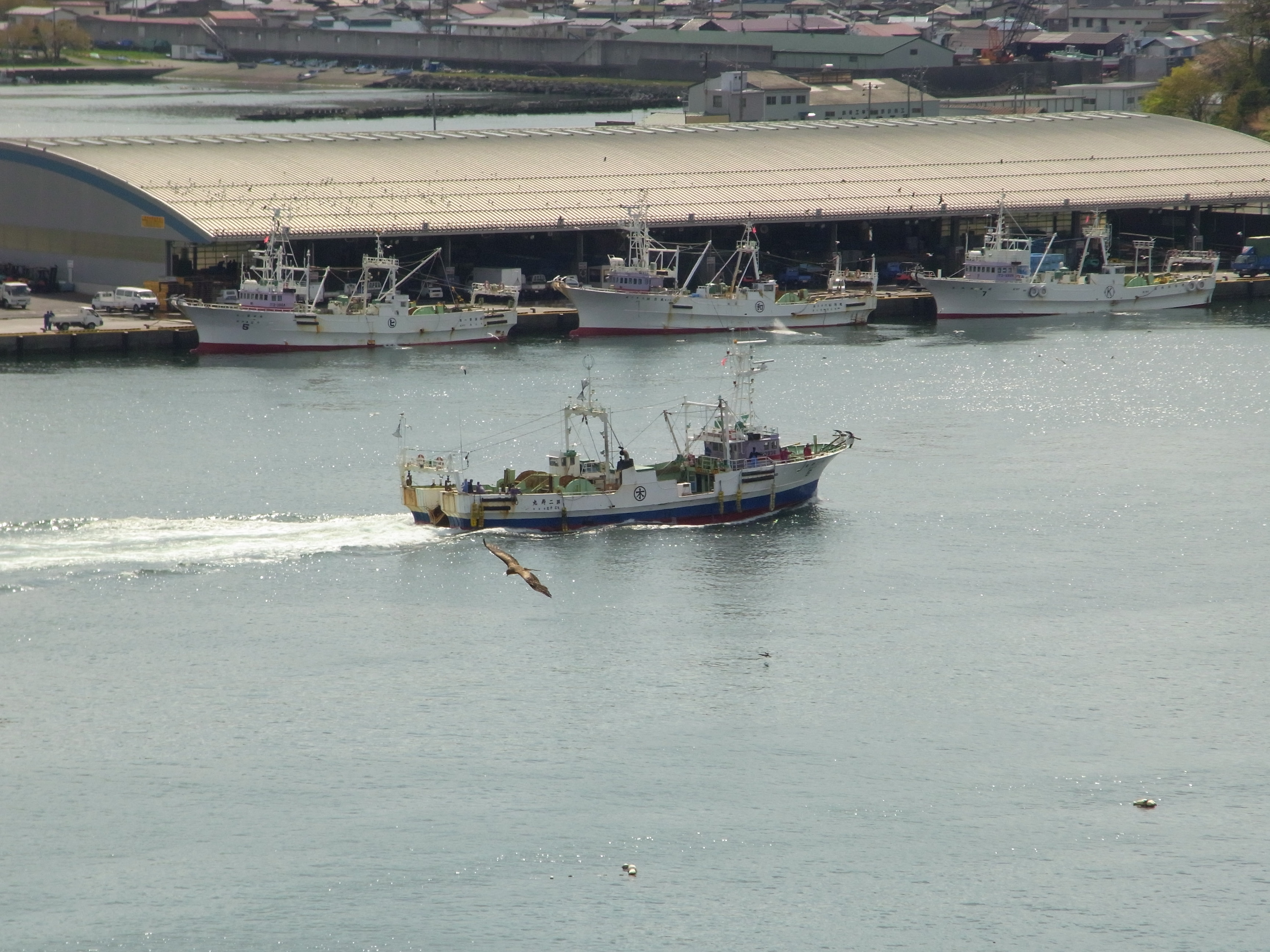 入港する底引き網漁船